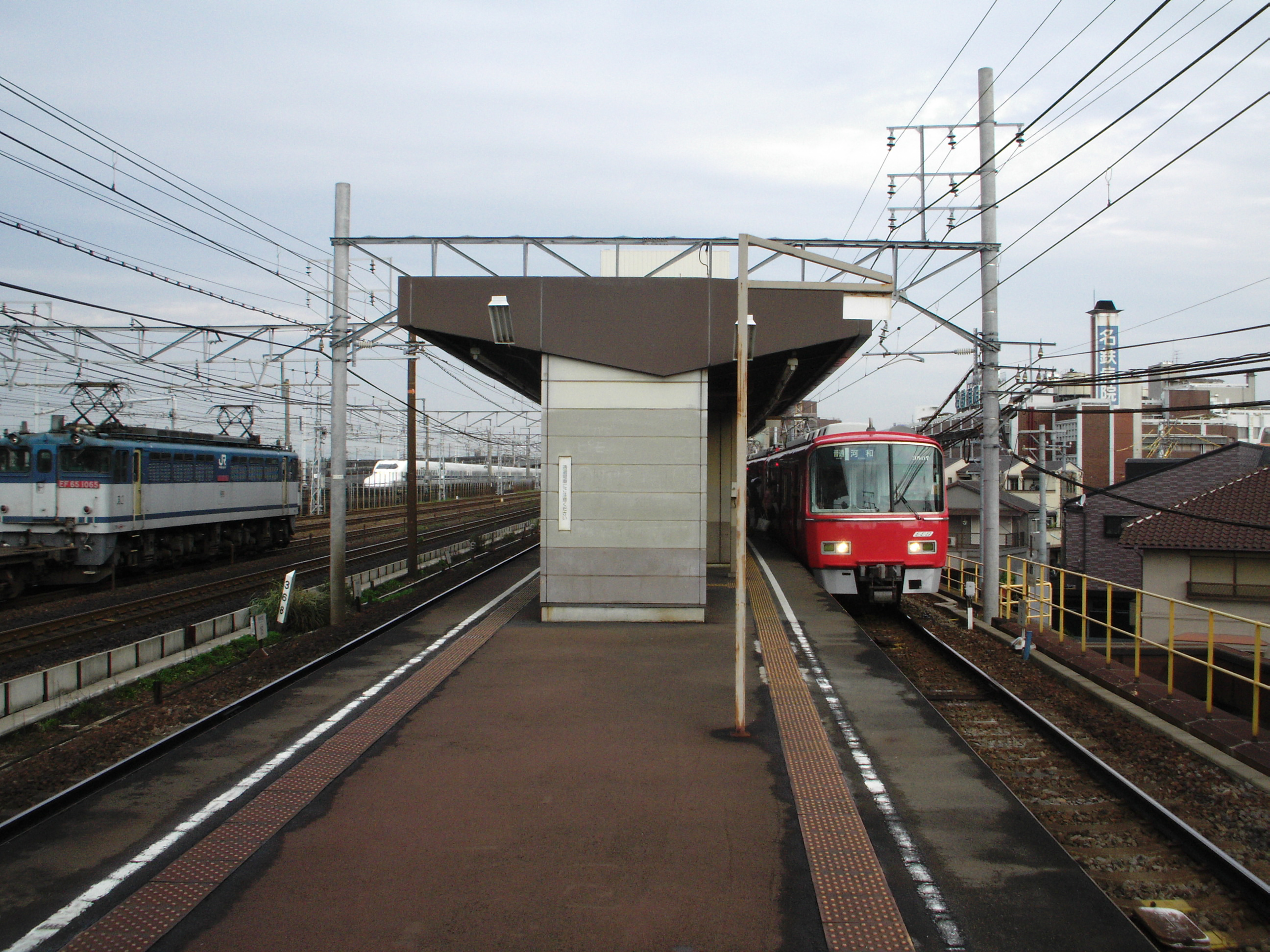 栄生駅プラットホーム